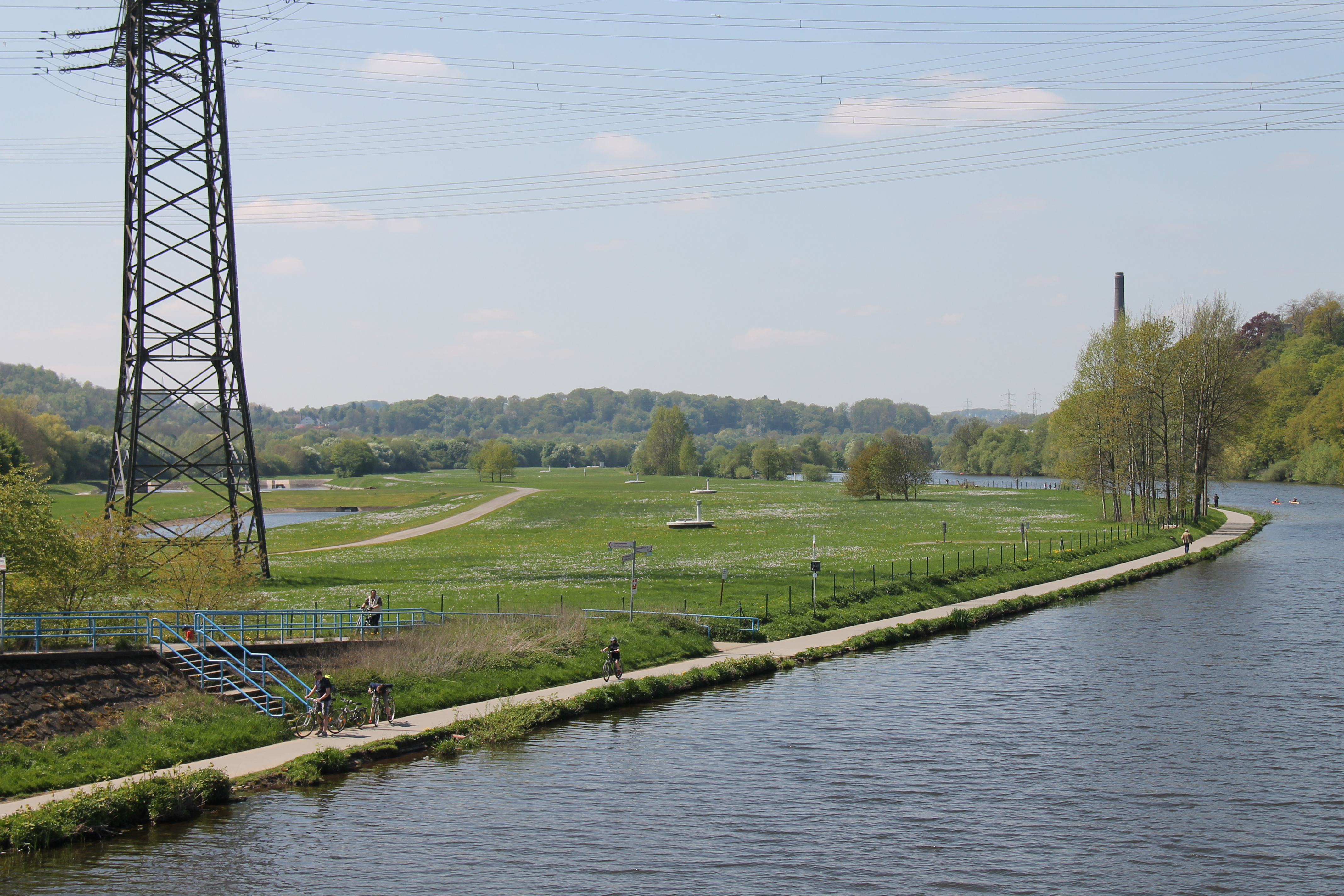 Blick auf die Wassergewinnungsanlage in Essen-Burgaltendorf an der Ruhr zur Trinkwassergewinnung; links Freileitungsmast (Bl. 4516 M6, 380/220 kV)